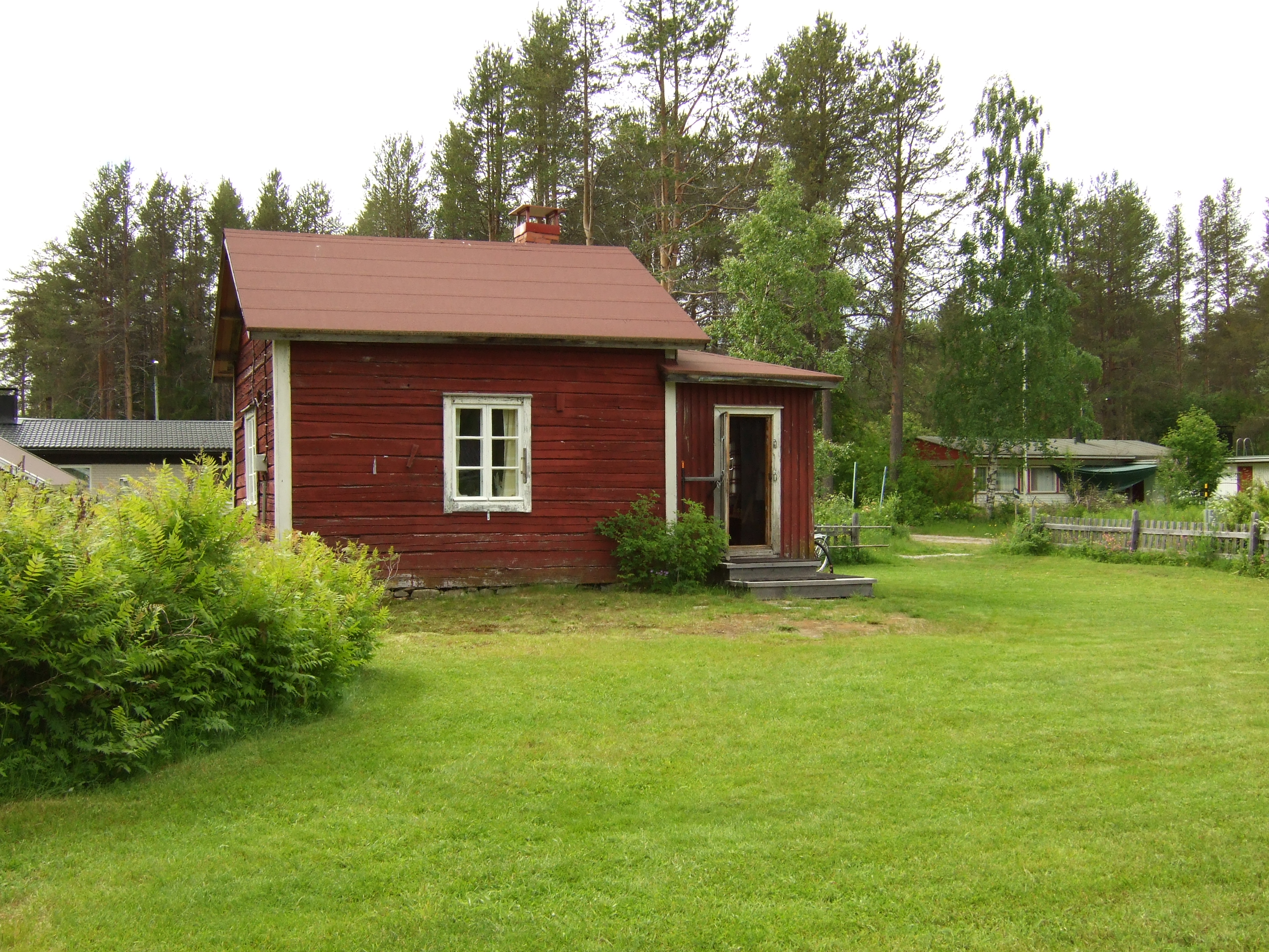 Kalervo Palsan kotitalo Palsa-museossa